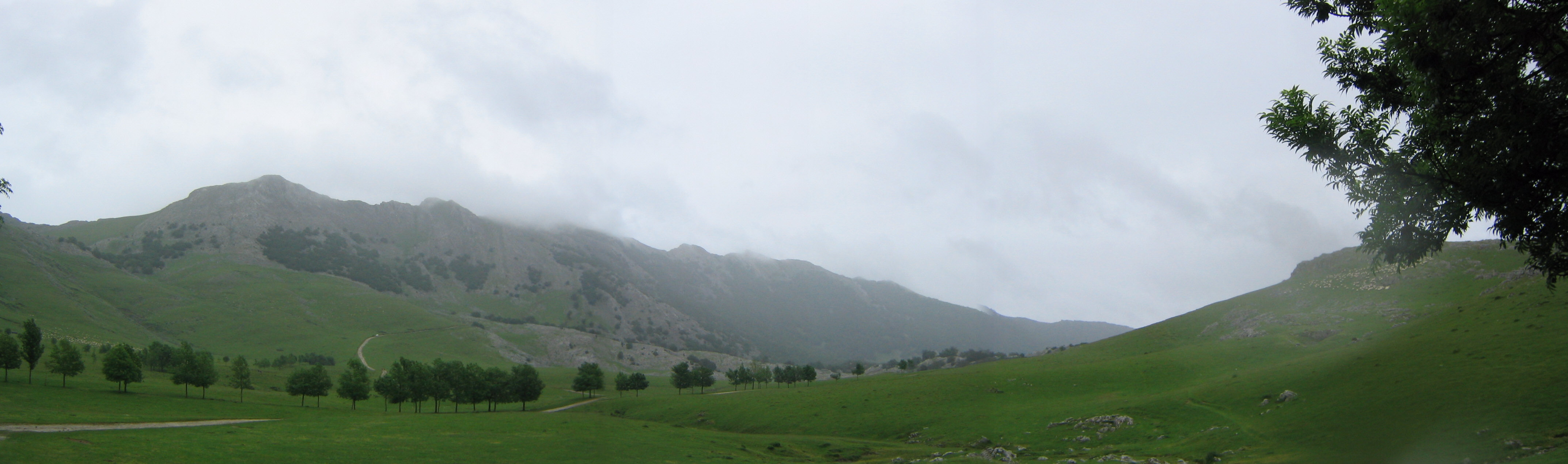 Macizo de Aitzkorri desde Urbia / Aitzkorriko mendilerroa Urbiatik